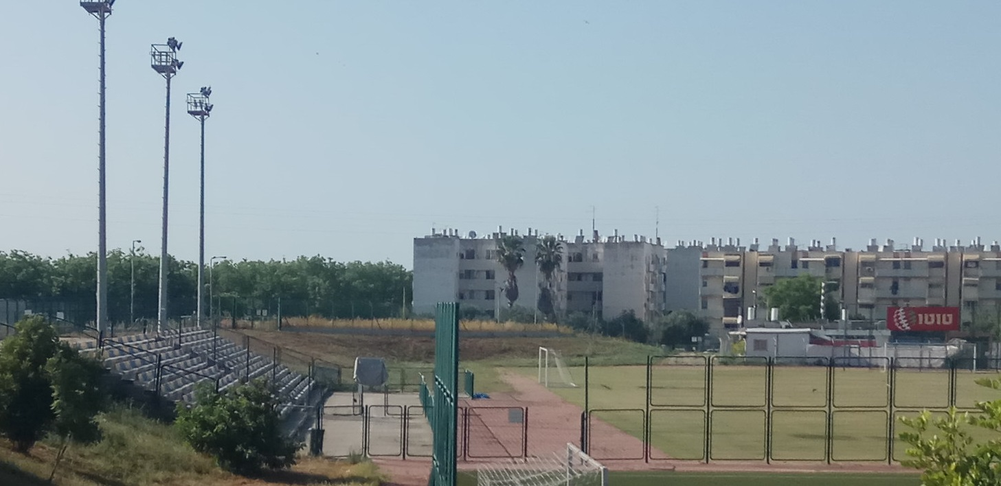 אצטדיון נינו, מבט מדרום